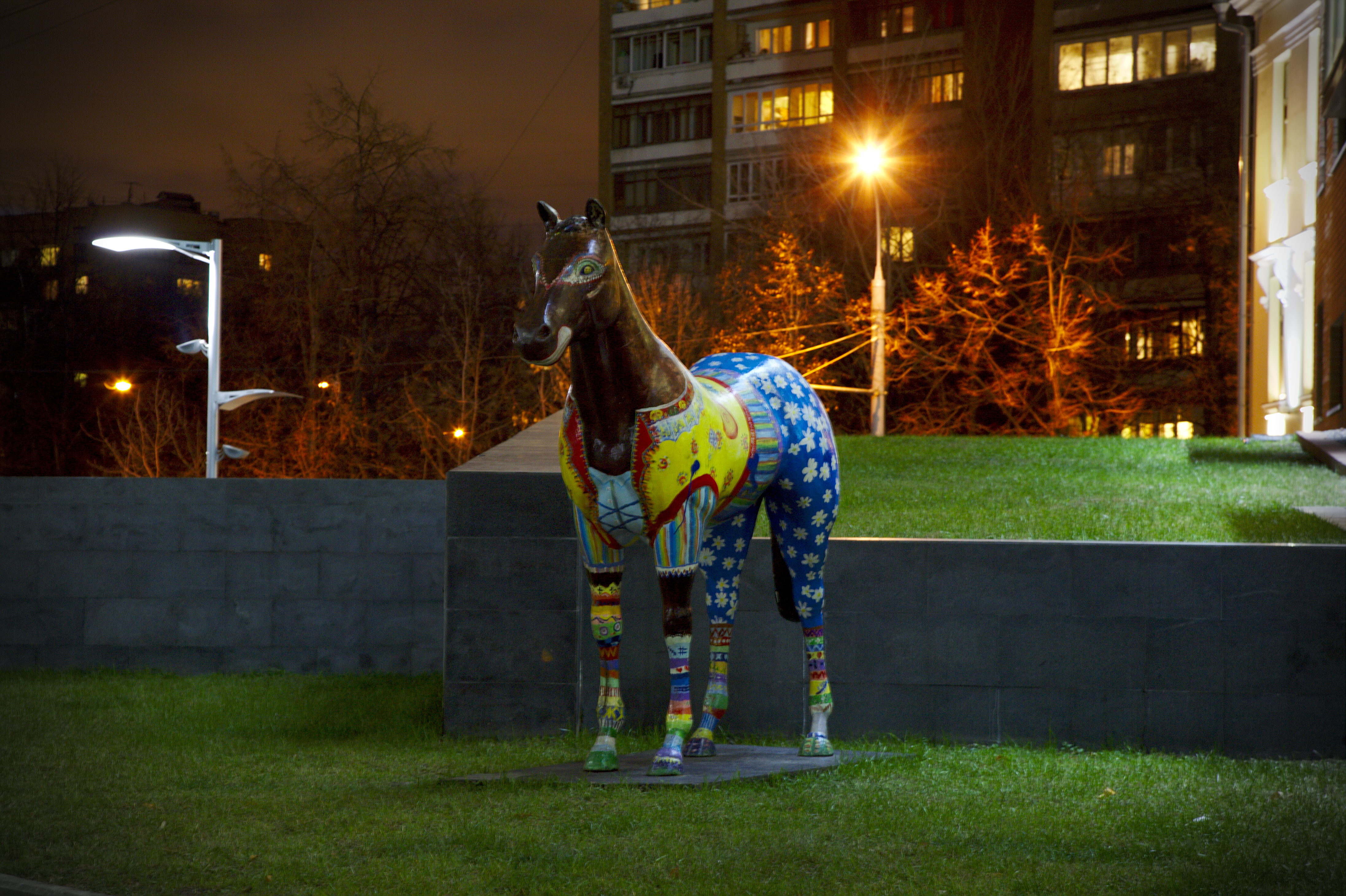 Талисман компании "Яндекс", конь, стоит у главного офиса.